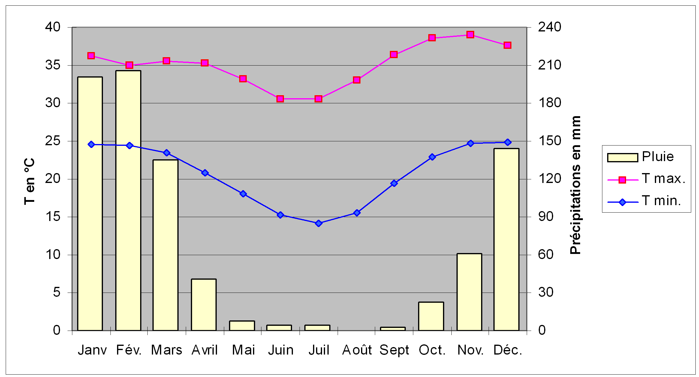 Diagramme climatique de la ville de Kimberley (Australie), comprenant deux courbes, représentant les températures maximales et minimales, et un histogramme, représentant la pluviométrie, pour les douze mois de l'année.